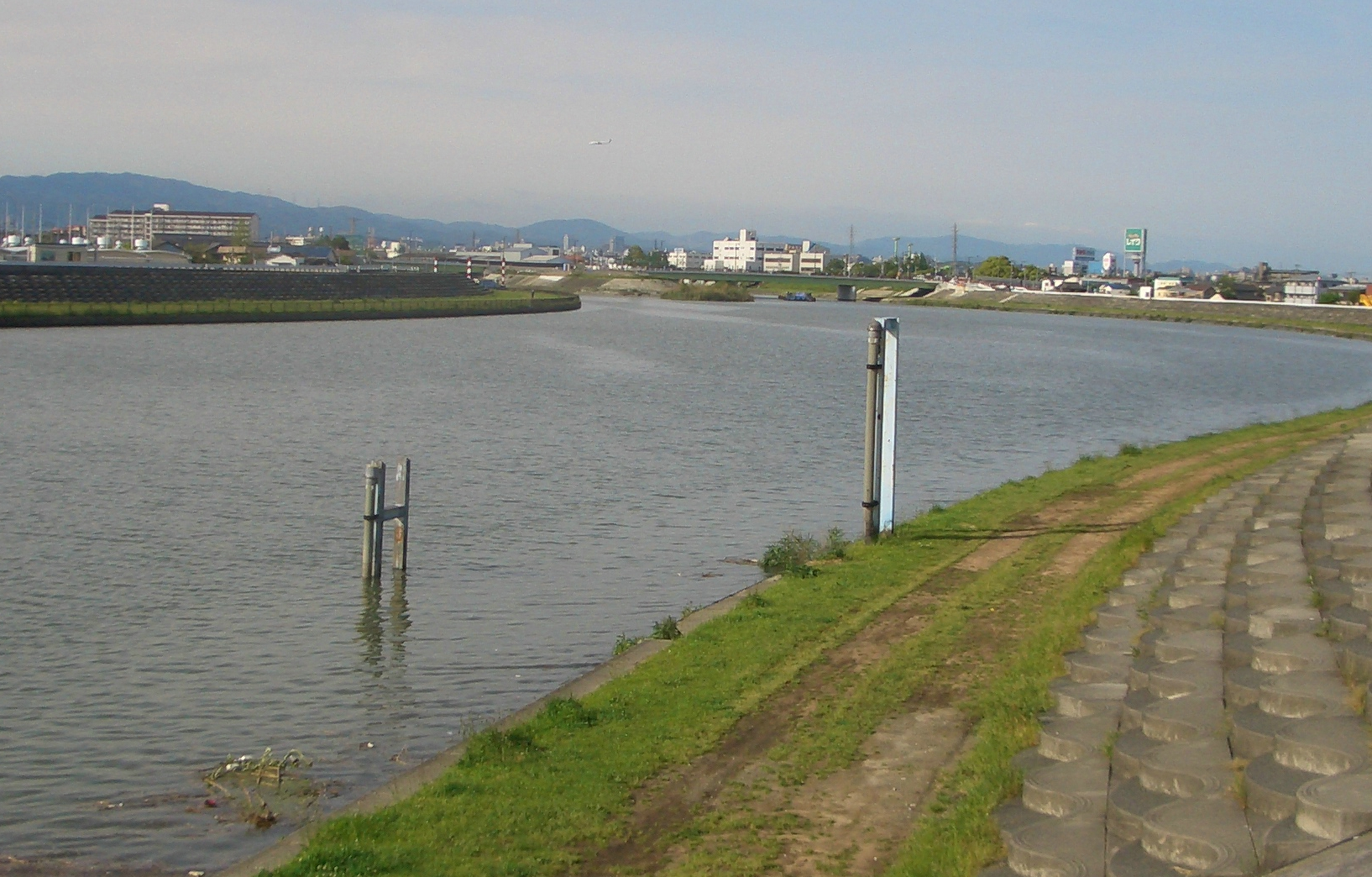 猪名川。ina river。